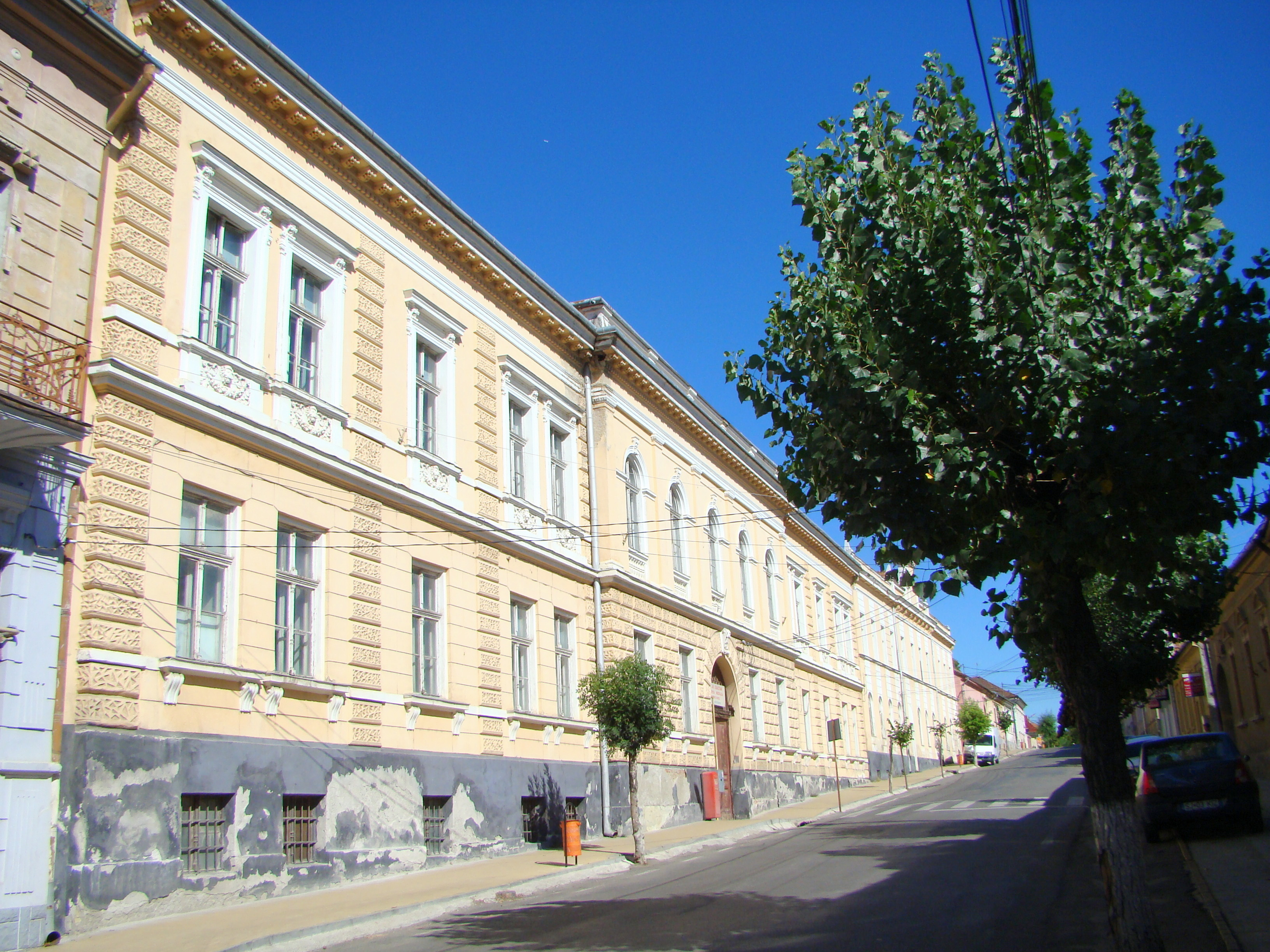 Fosta bibliotecă orășenească, Azi Centrul de Cercetări și Asistență Medicală, oraș Șimleu Silvaniei